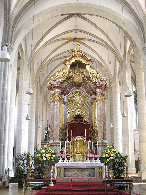 Dom zu Eichstätt (Oberbayern). Blick aus dem Westchor (Willibaldschor) ins Langhaus. Eigene Aufnahme, April 2007 / Eichstaett cathedral (Upper Bavaria, Germany). Interior, western choir (Willibaldschor). Looking into the nave. Own photo, April 2007